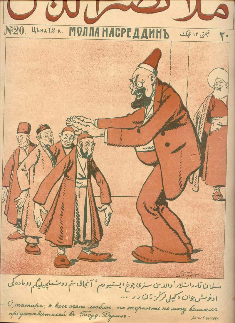 Под "татарами" имеются в виду "азербайджанцы". Журнал "Молла Насреддин" (№ 20, 1909 г., г. Тифлис)